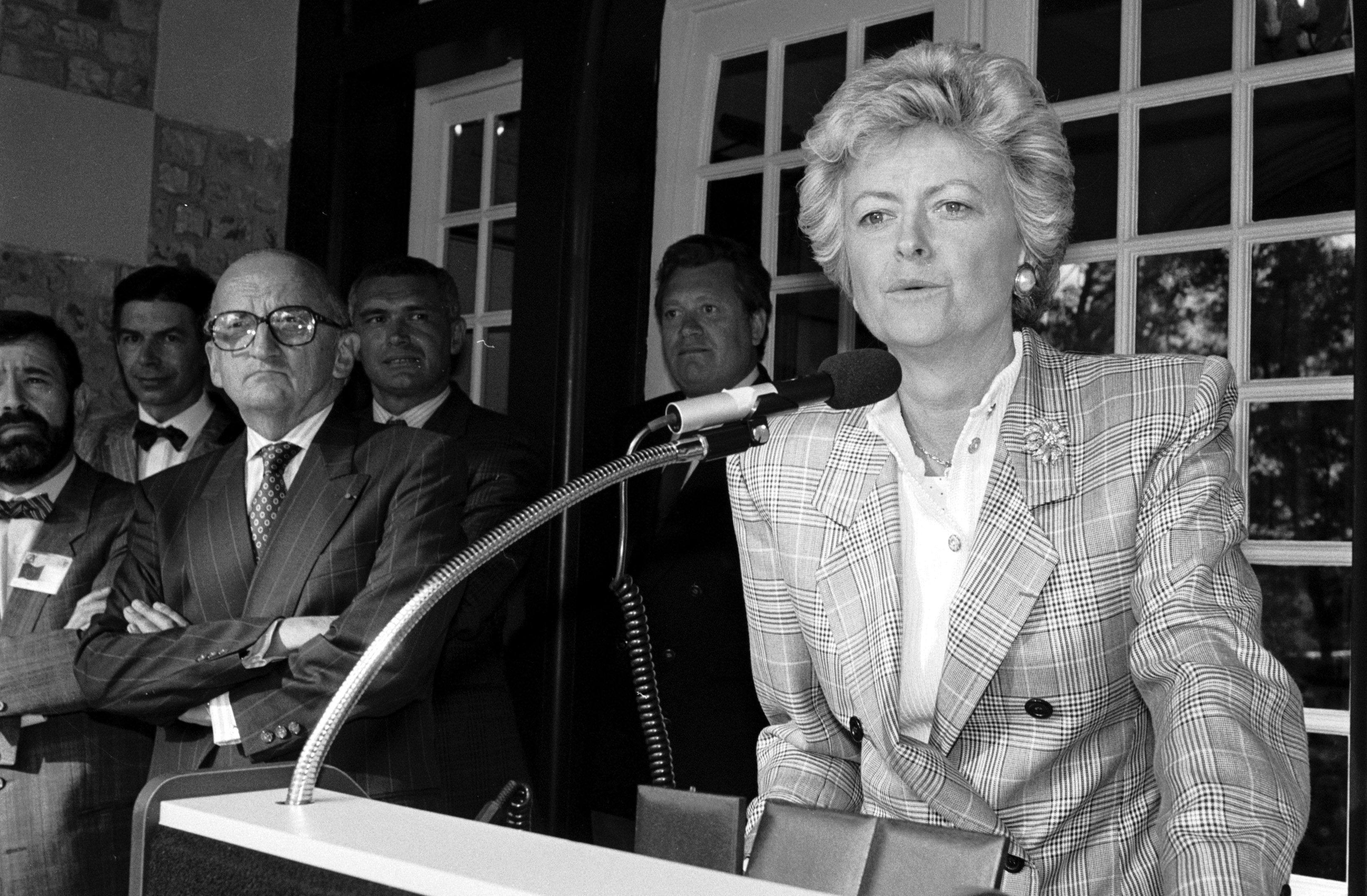 Anne d'Ornano à Deauville (Normandie, France) en 1990.